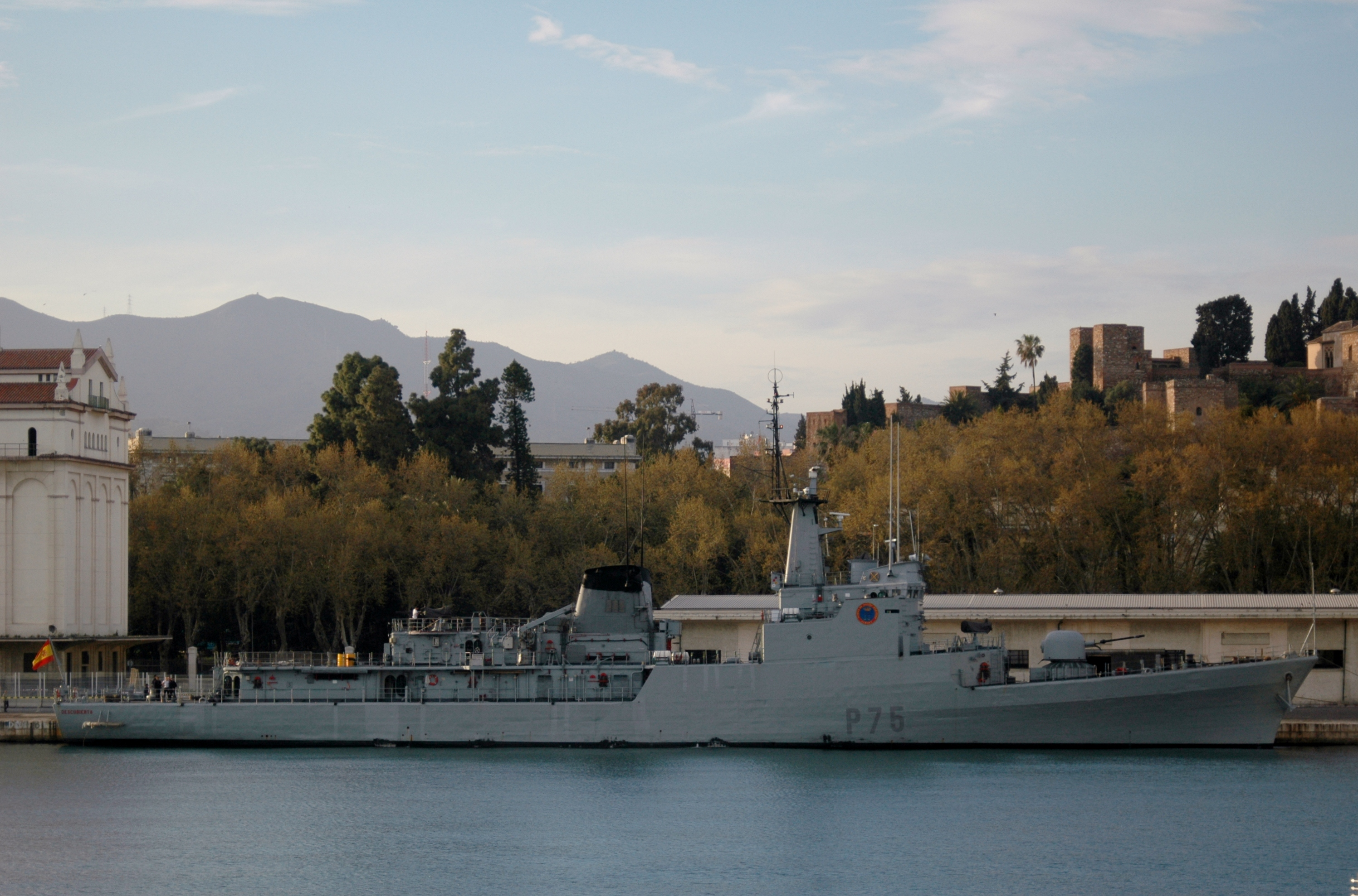 Patrullero Descubierta (P-75), Ex-corbeta Descubierta (F-31)